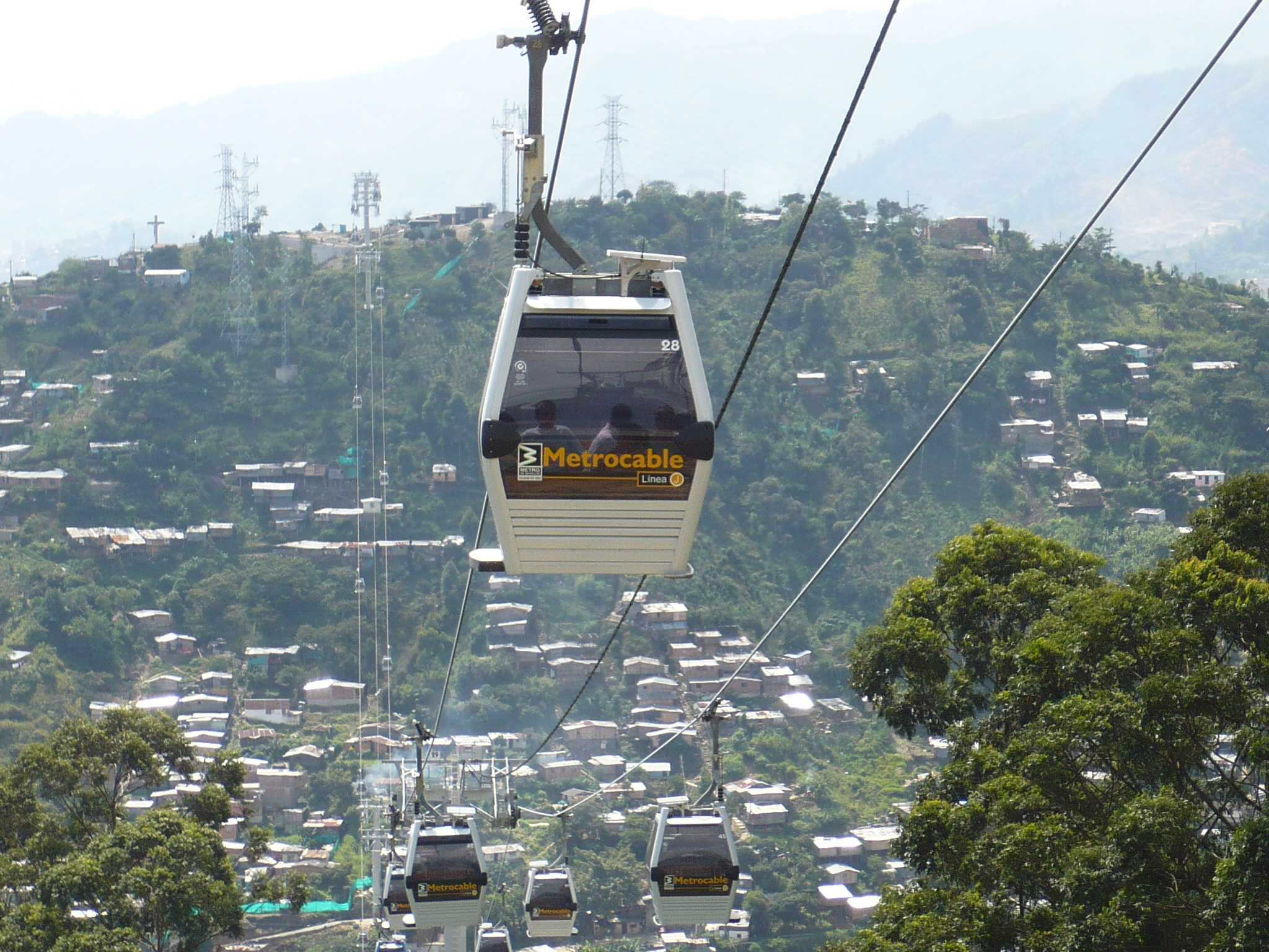 "Donde llega el metro, llega el progreso" nos dijo una usuaria luego de contarnos que su casa en una invasión de las laderas del Occidente de Medellín se la habían cambiado por un apartamento nuevo.